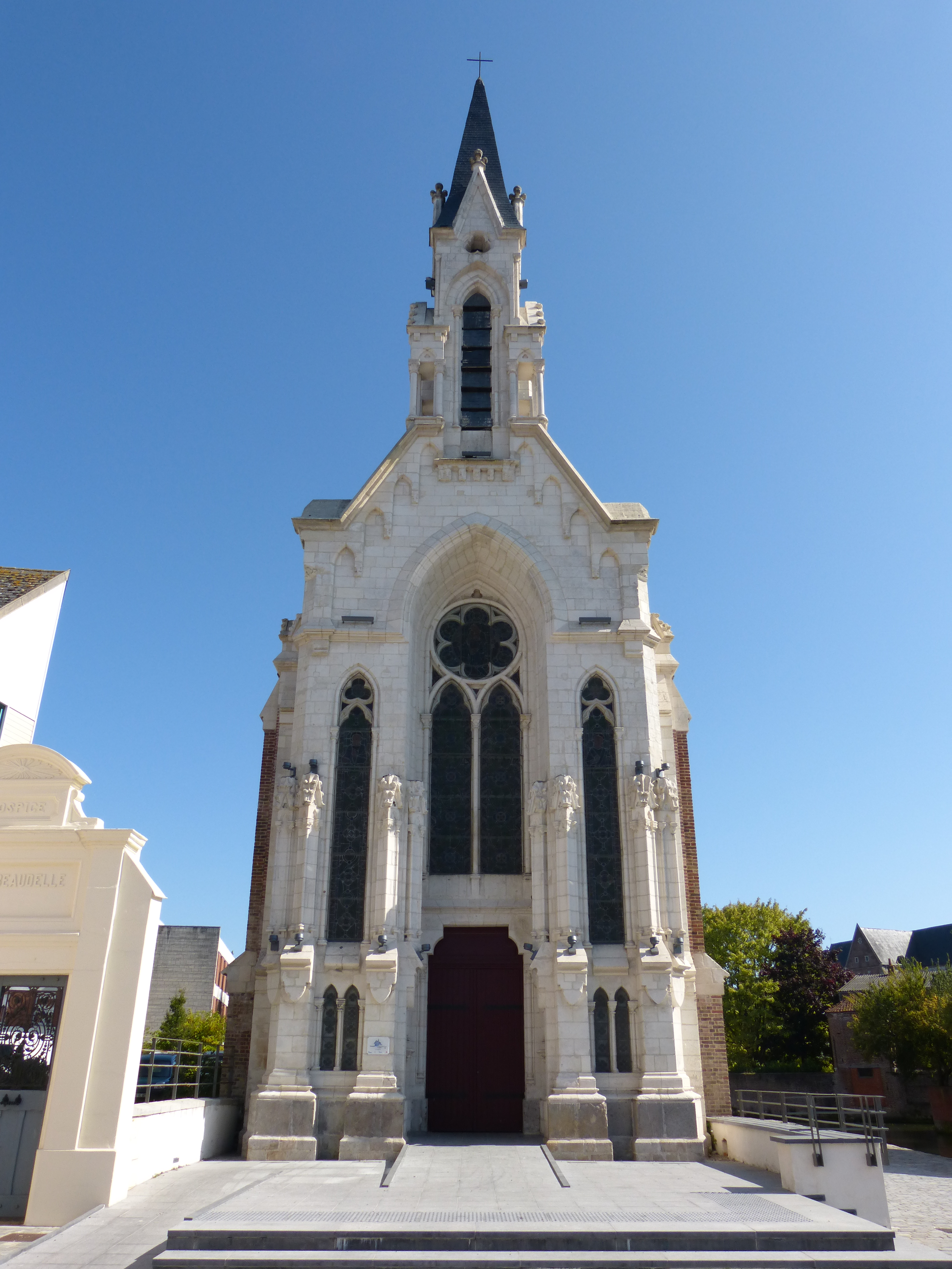 La chapelle Baudelle vue de la place du Rivage